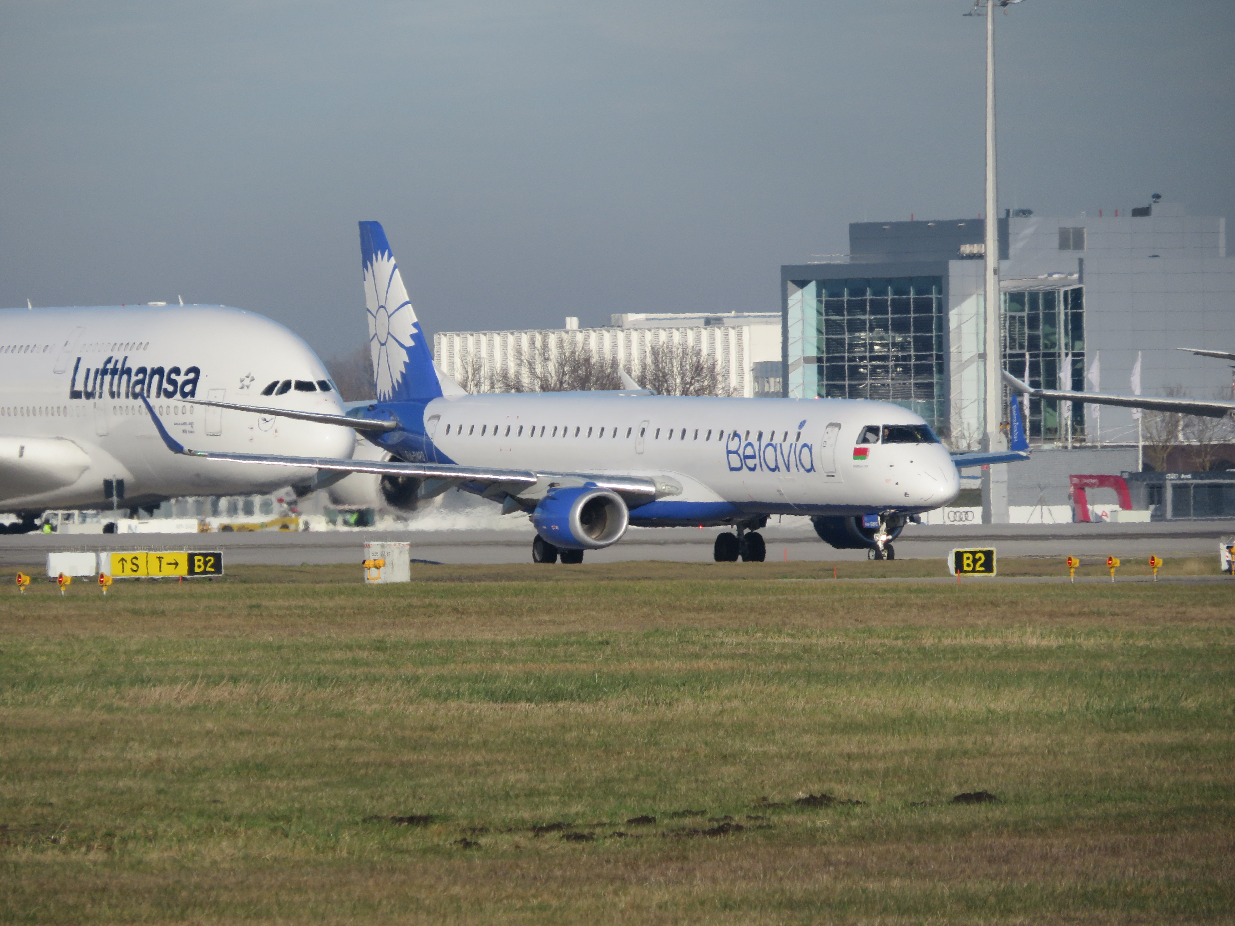 Embraer ERJ-195LR cn/serial number: 19000756 Belavia 2018 as EW-514PO